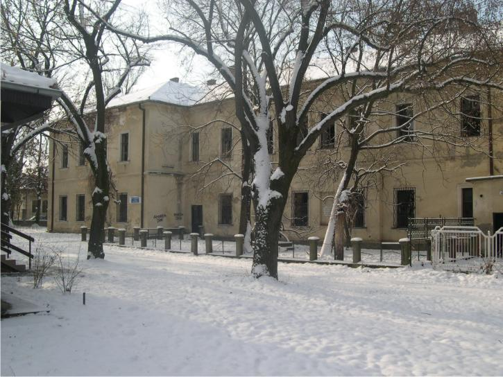 Зграда депоа Историјског архива „Средње Поморавље” у Јагодини, некадашња зграда Учитељске школе.